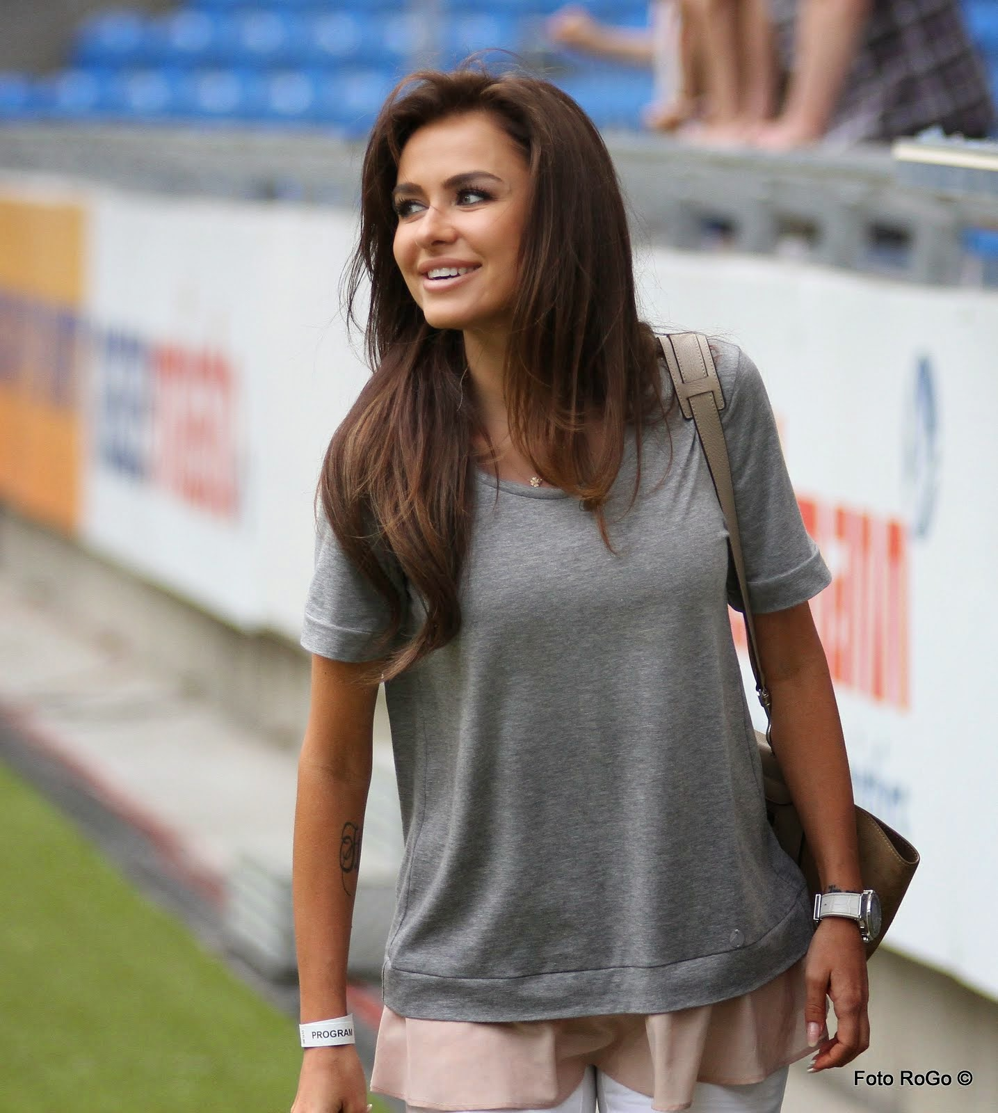 Natalia Siwiec